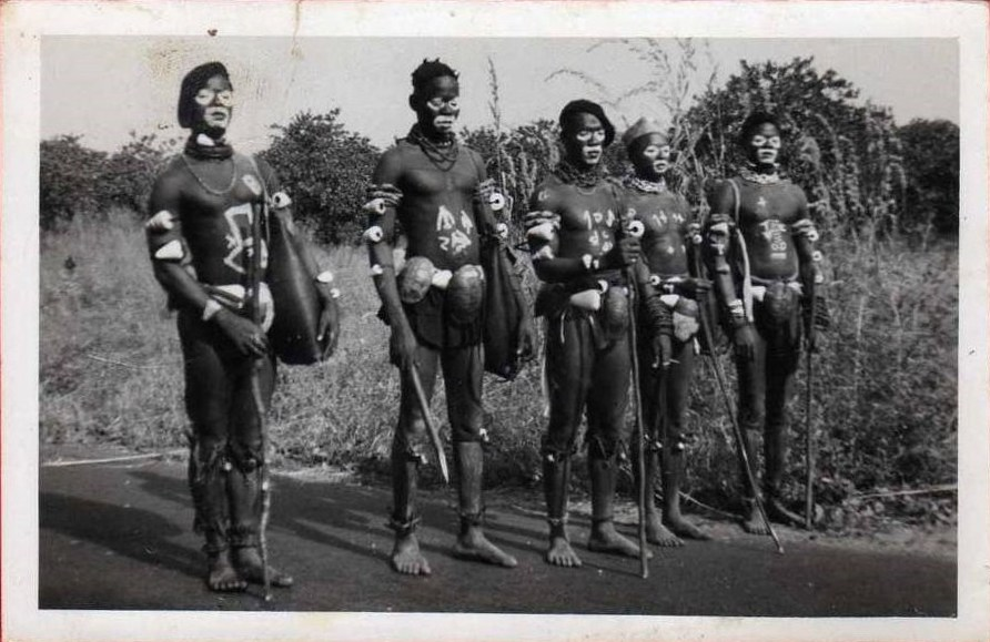 Postcard: Foto Serra No 052 - Grupo de Nahés (papeis) (circ. 1962)